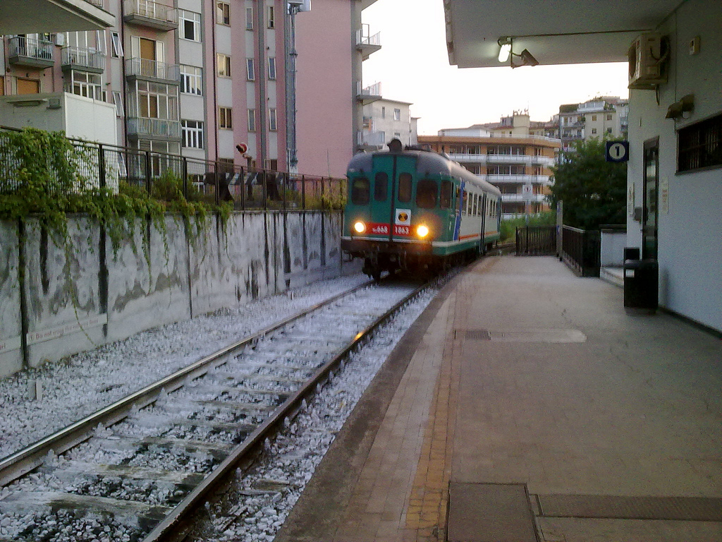 Stazione ferroviaria di Salerno Irno